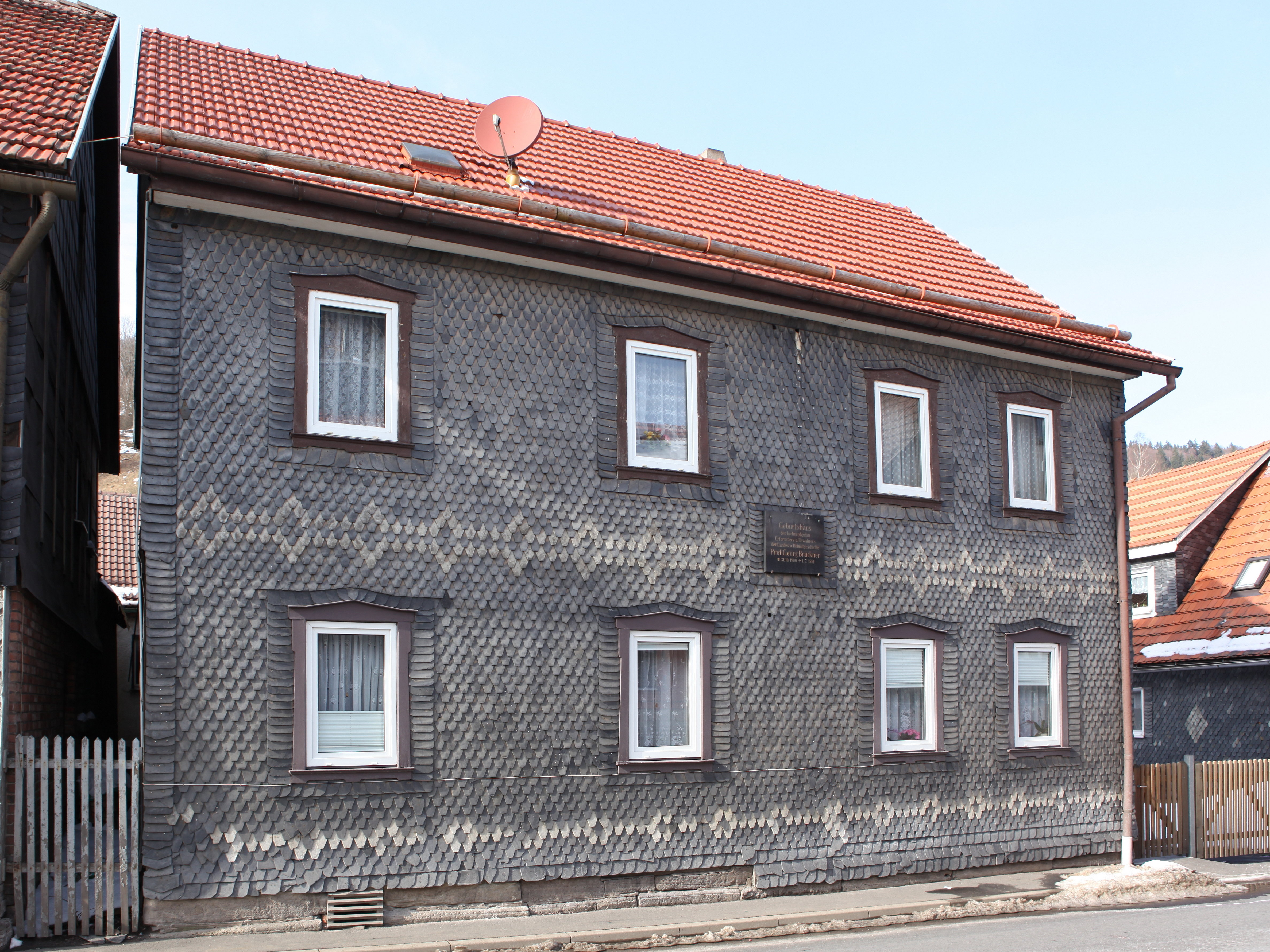 Geburtshaus von Georg Brückner in Schönbrunn, OT von Schhleusegrund, Landkreis Hildburghausen